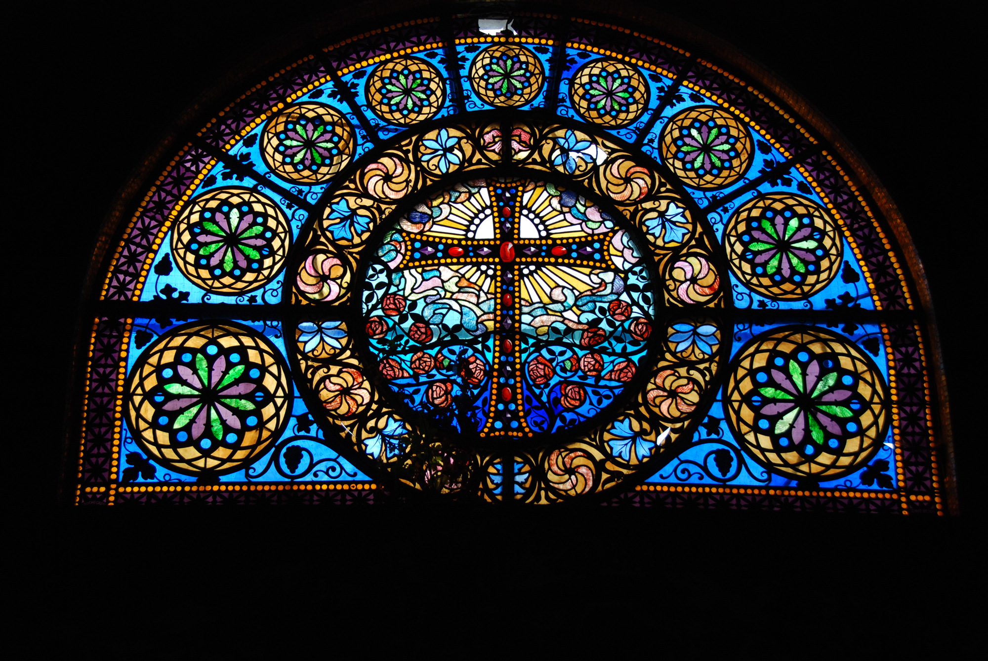 Bourgogne mausoleum - Eastern window